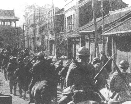 Japanese cavalry entering Mukden (Shenyang)